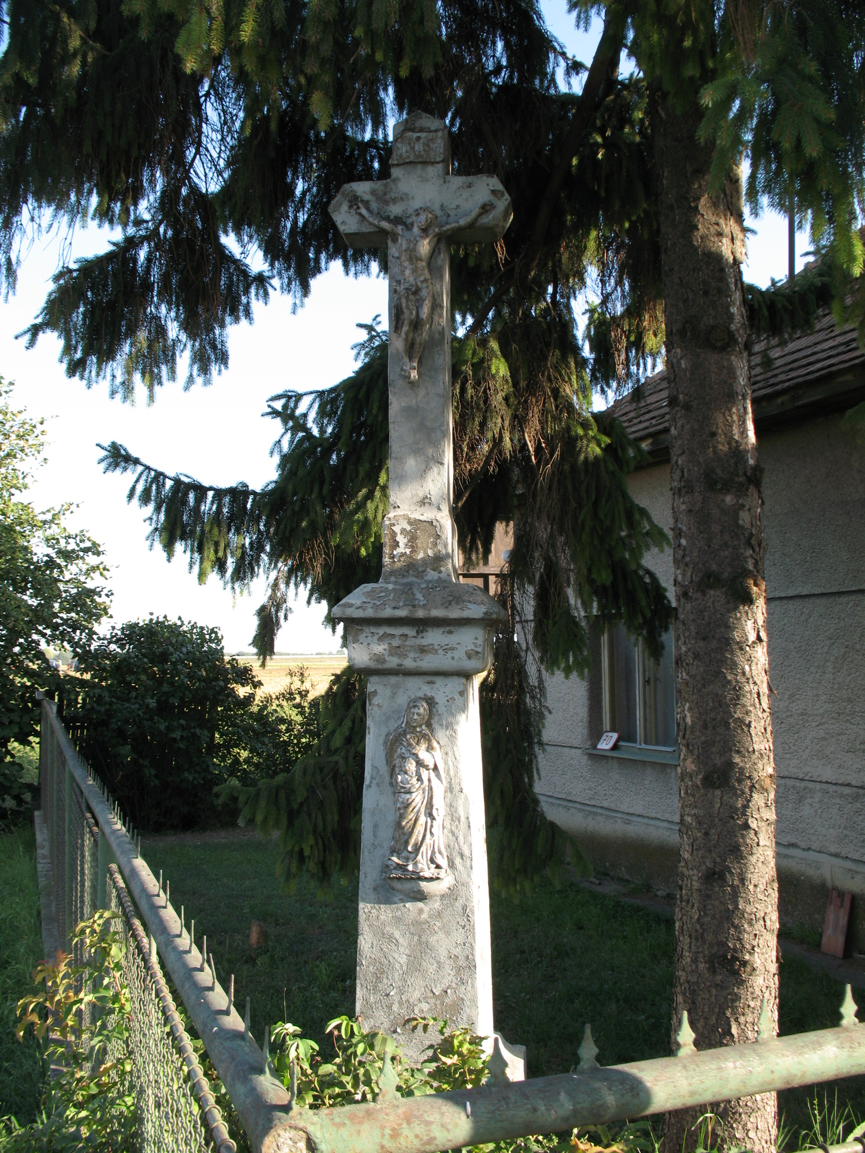 Vágvecse kereszt